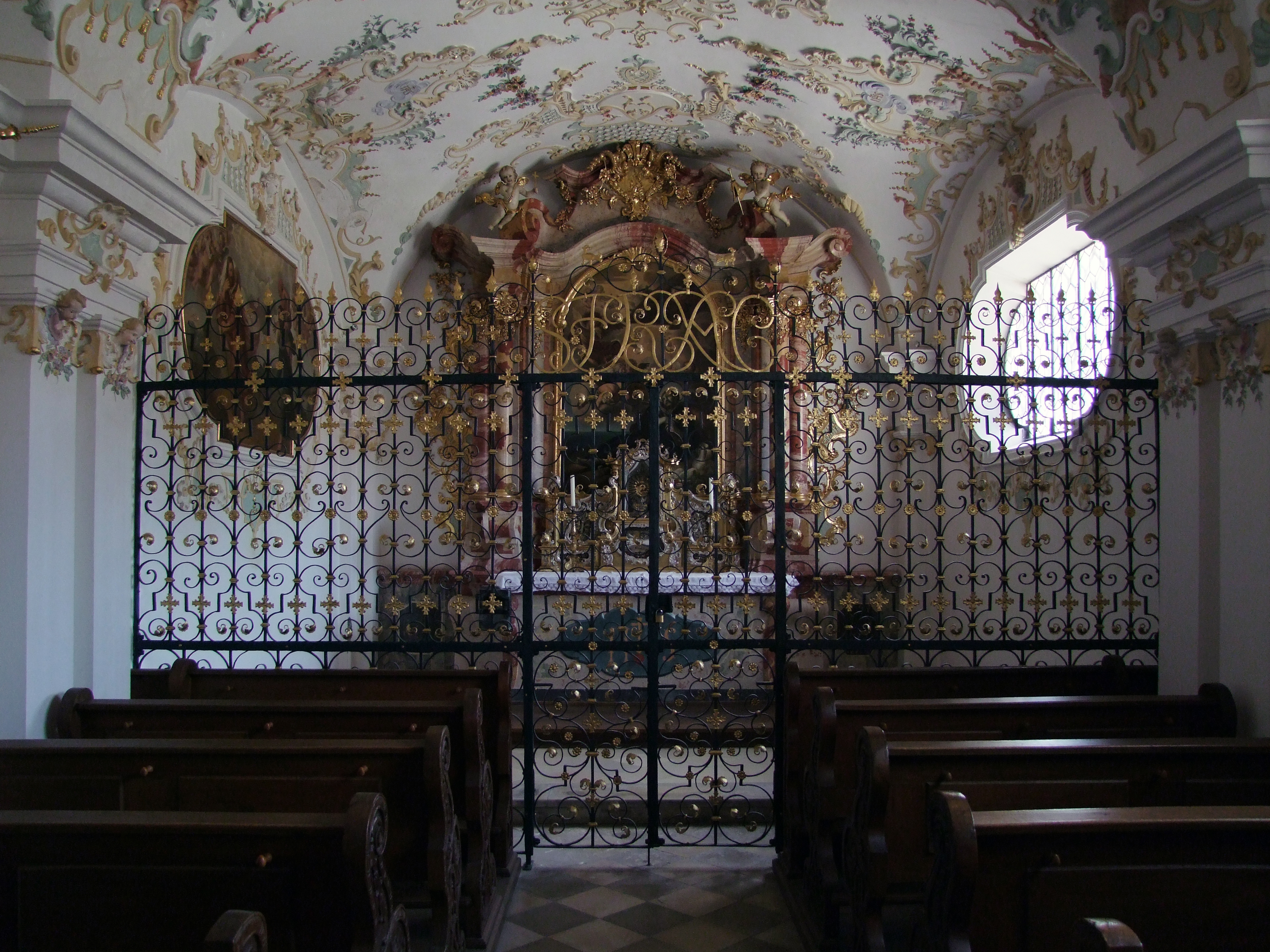 Mariä Verkündigung im oberschwäbischen Mindelheim. Ehemalige Augustiner, dann Jesuitenklosterkirche.